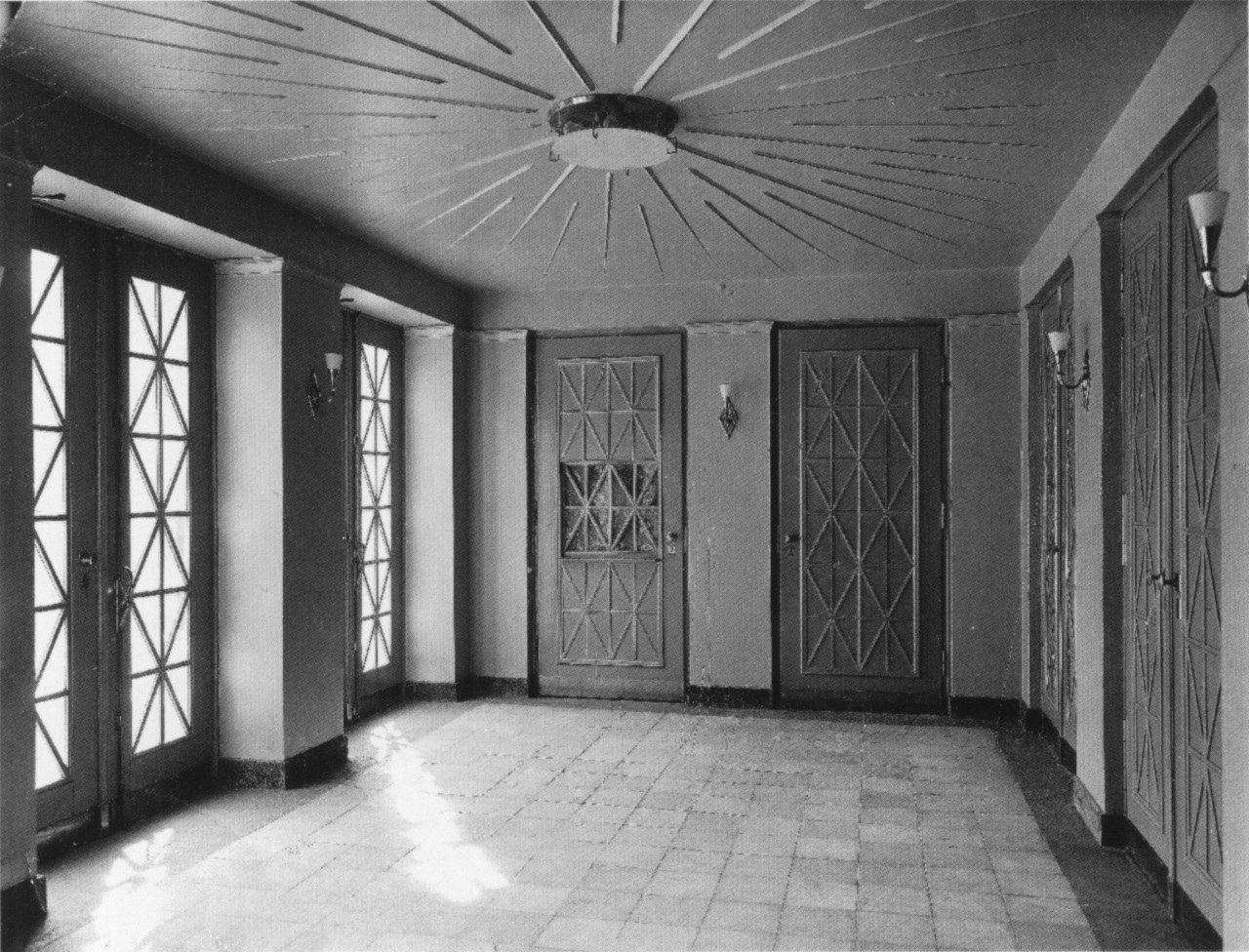 Ansicht der Eingangshalle des am 20. Mai 1926 eingeweihten Planetariums auf dem Zoogelände (Pfaffendorfer Straße Ecke Kickerlingsberg). Das Planetarium wurde am 4. Dezember 1943 durch einen Bombenangriff zerstört und nicht wieder aufgebaut. Der Saal des Planetariums fasste 600 Zuschauer.